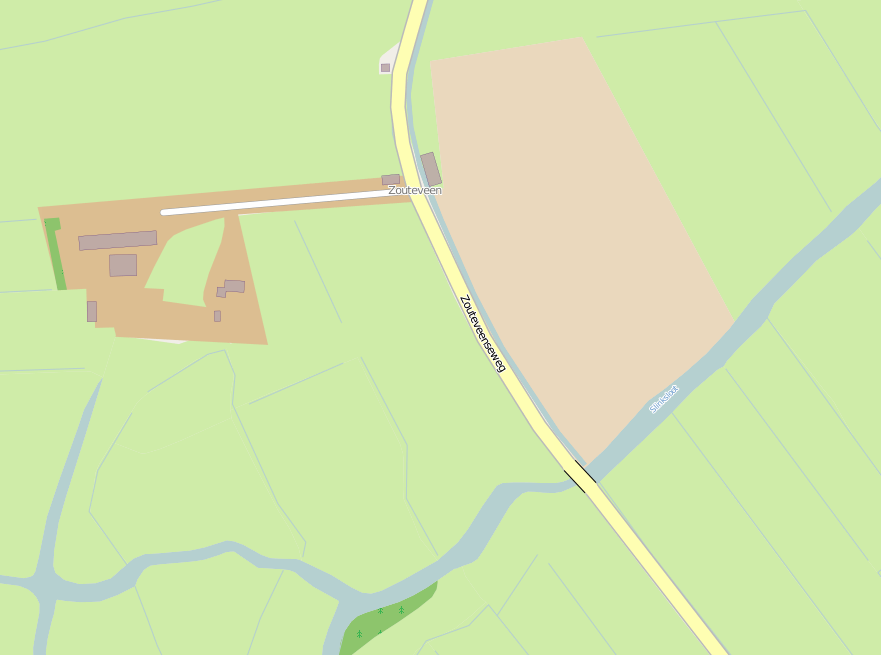 geografische kaart via [1]